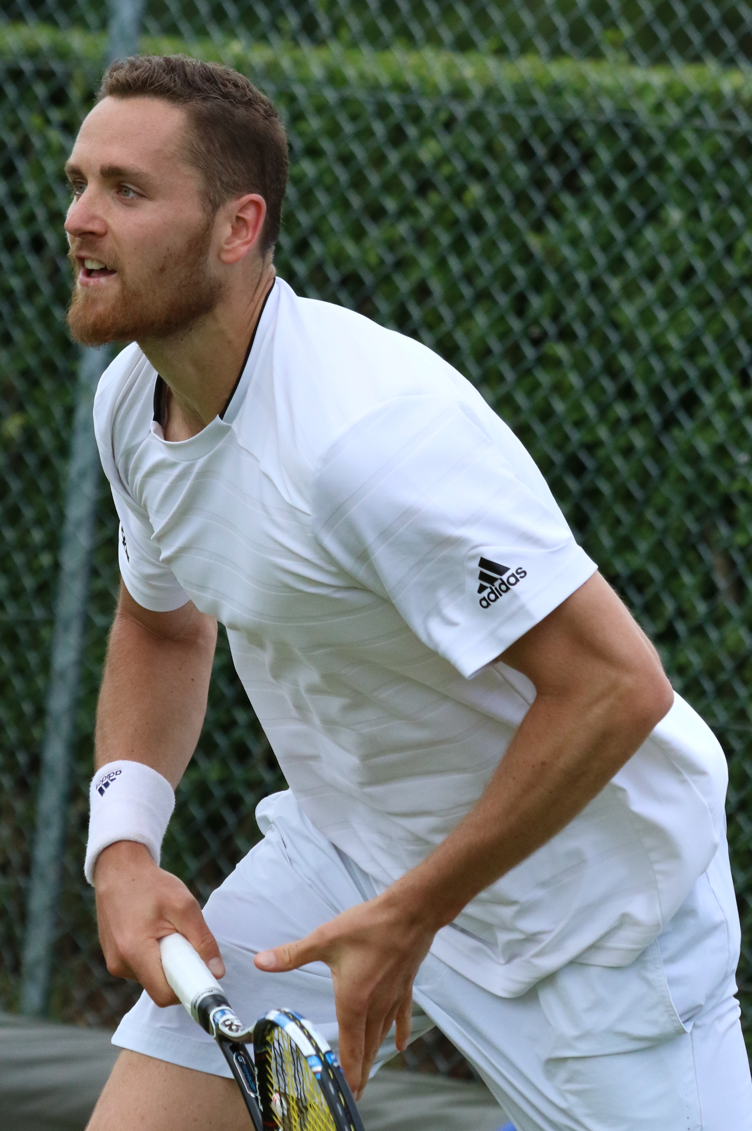 Olivetti WMQ16 (11)